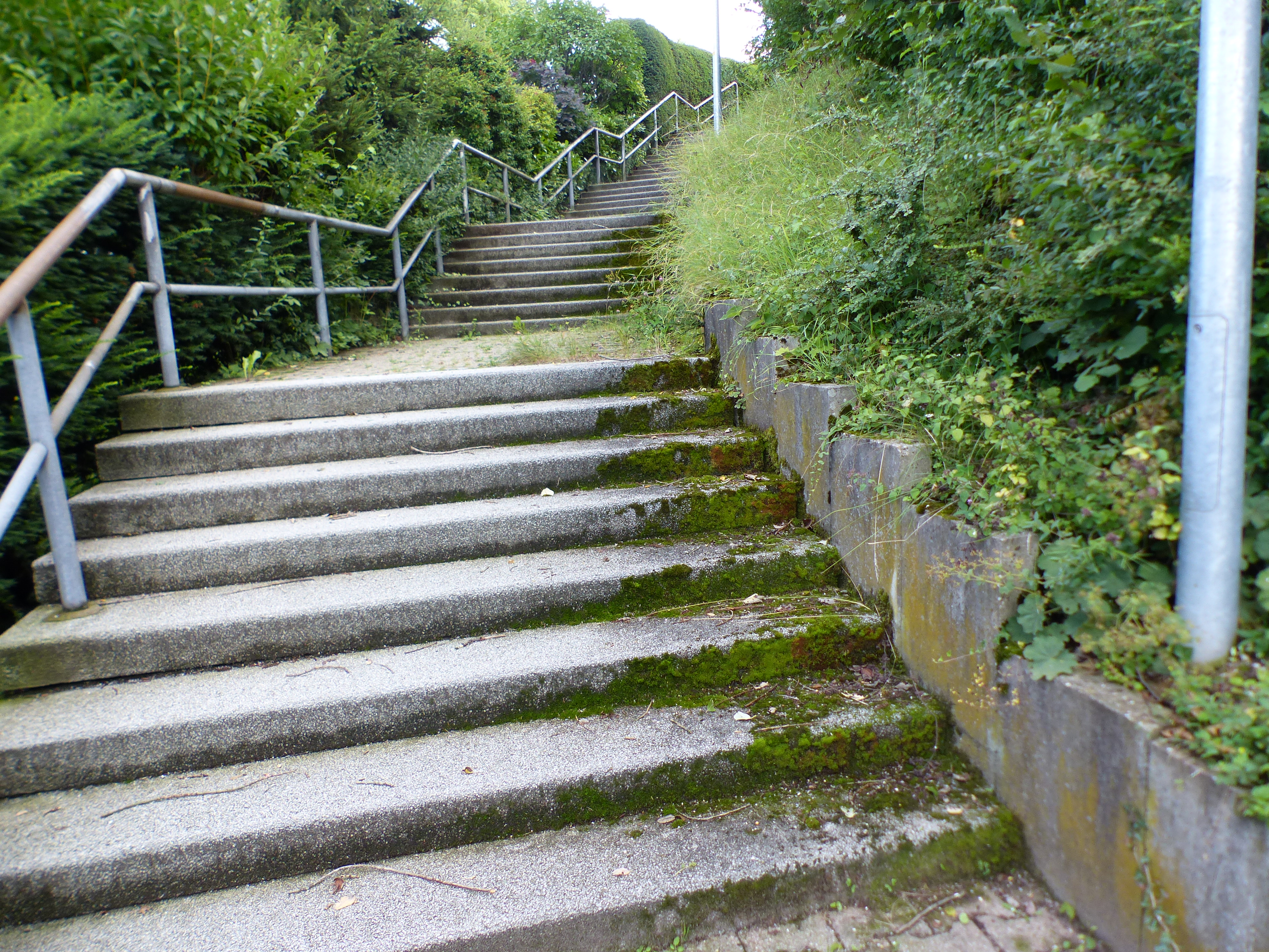 Emma-Aberle-Staffel, Standort: oben: Vaihinger Landstraße, unten: Emma-Aberle-Weg, Stadtteil: Botnang-Süd, Stadtbezirk: Botnang, Stadt: Stuttgart